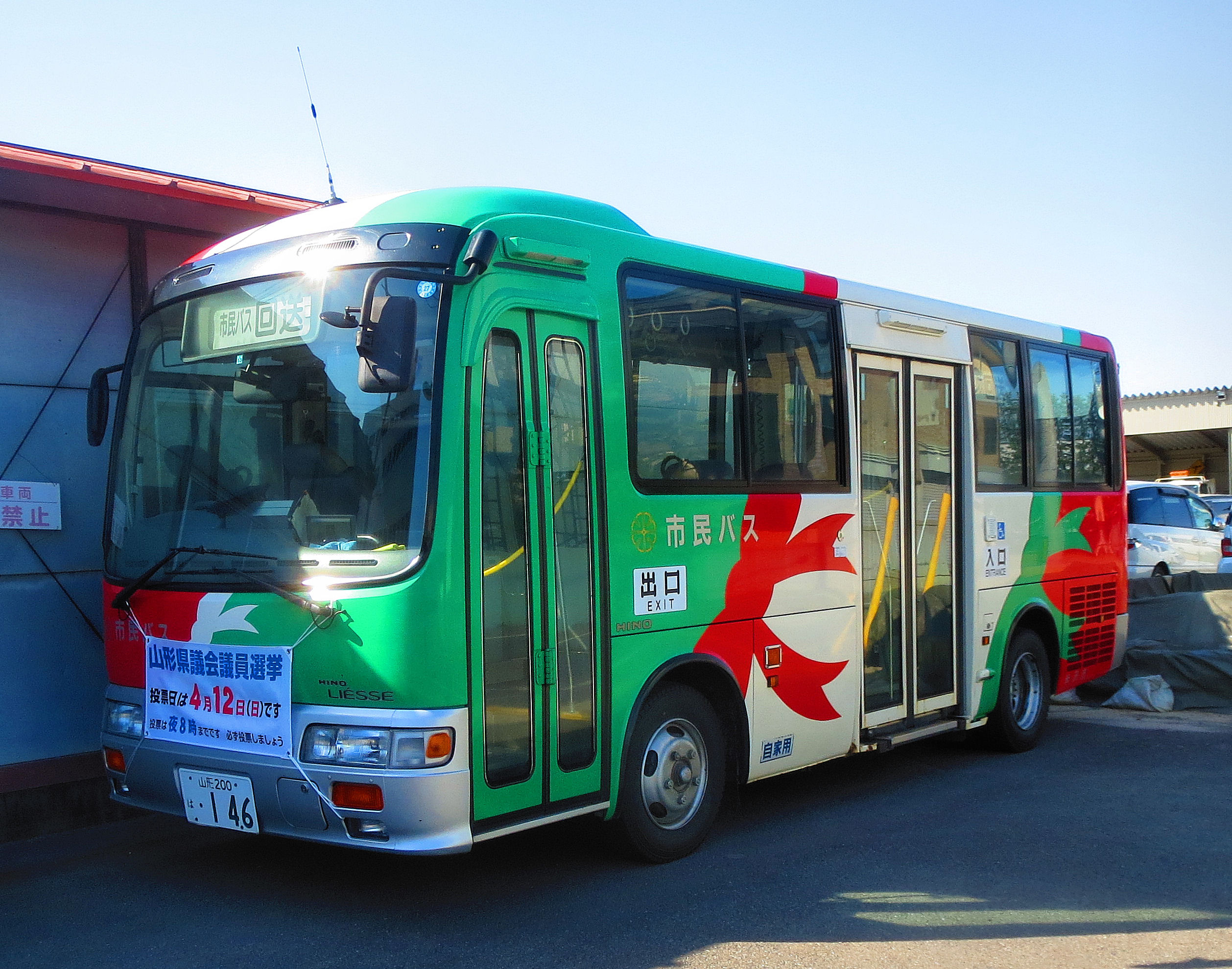 米沢市役所・万世線